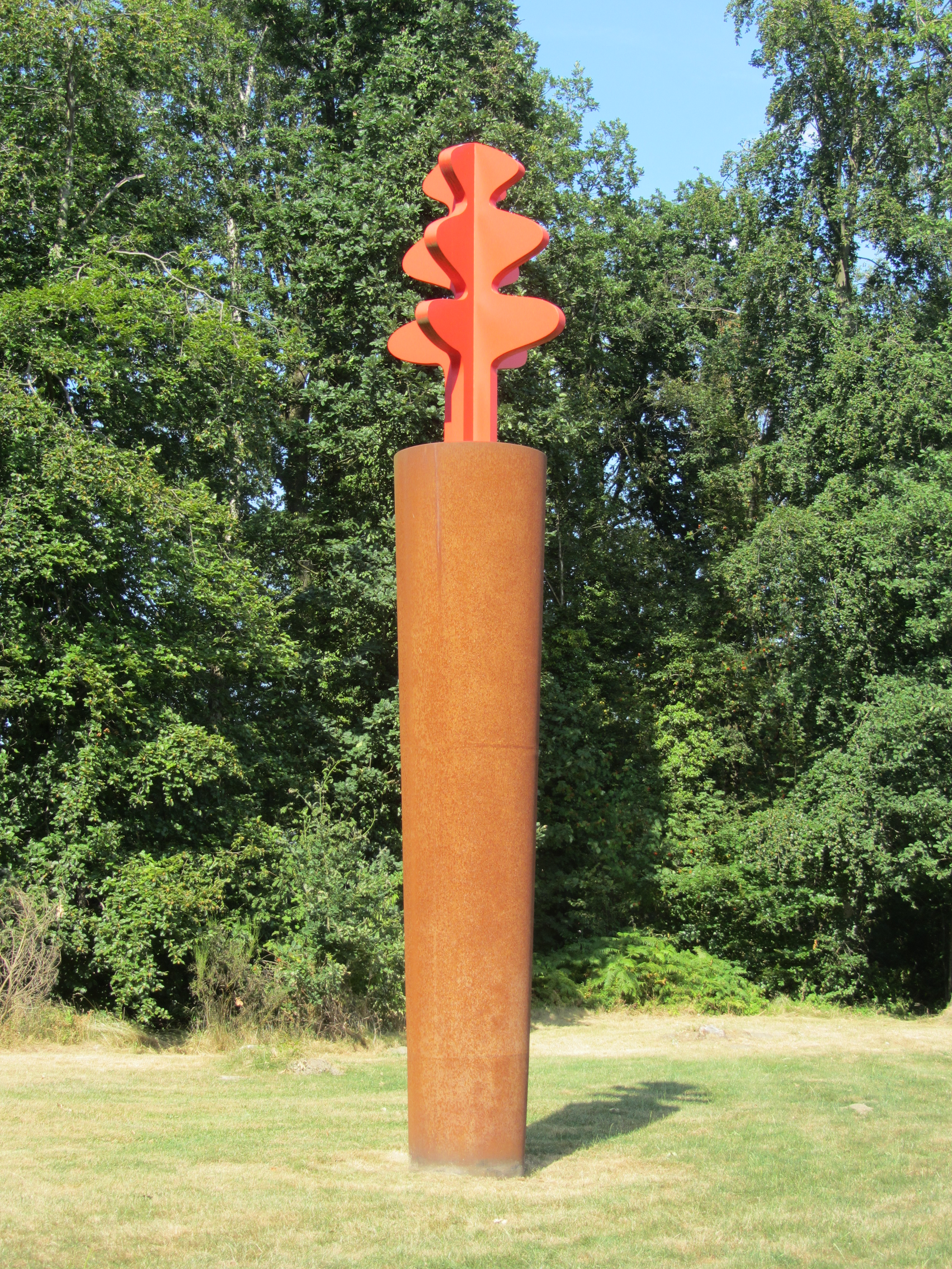 "Le sapin rouge" 2013, sculpture de Jean-Pierre Ransonnet (acier peint en rouge sur un cylindre en acier Corten), Musée en plein air du Sart Tilman, Université de Liège, Belgique